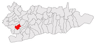 Categorie:Hărţi ale judeţului Călăraşi